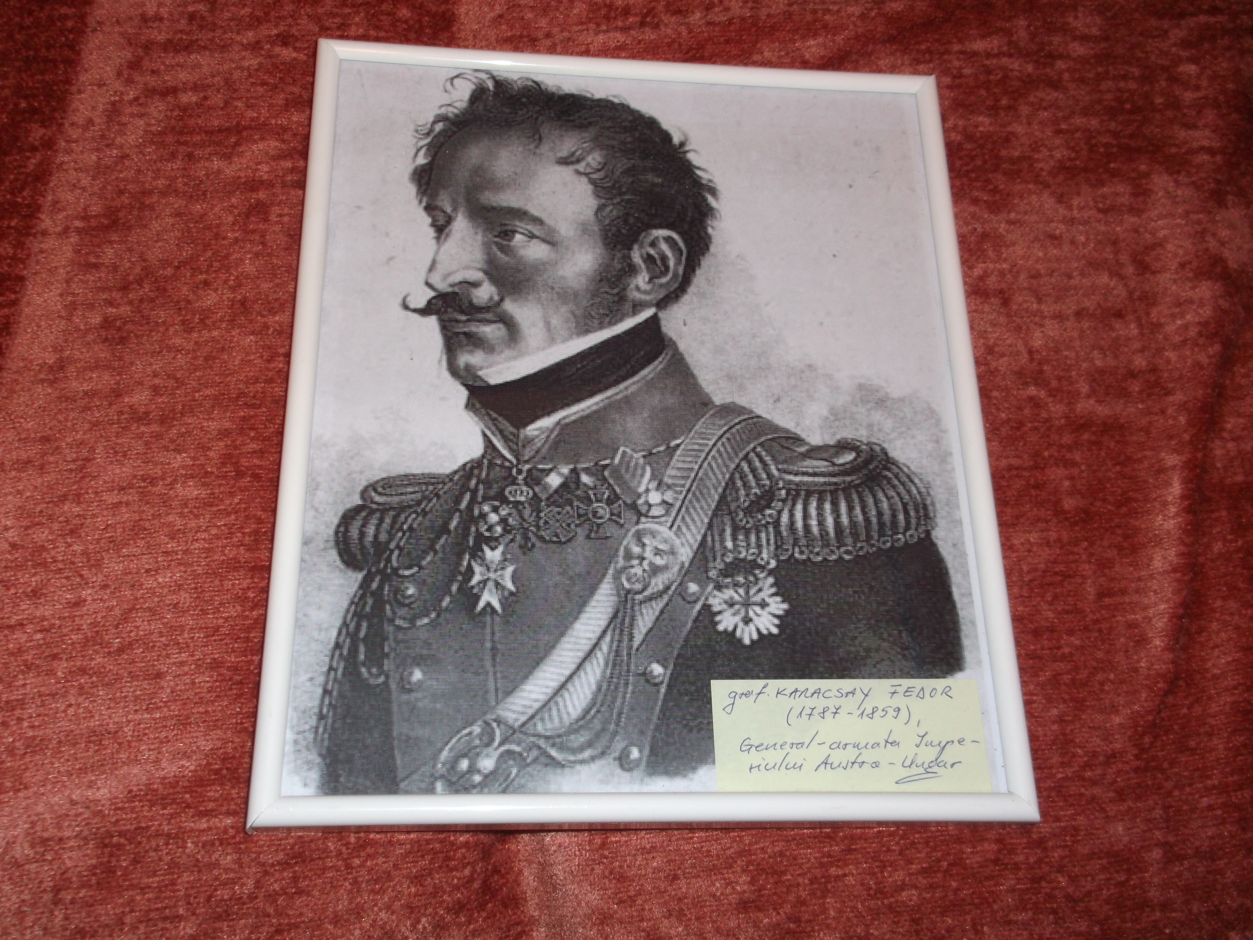 Grof Karacsay Fedor , general in armata austro - ungara .